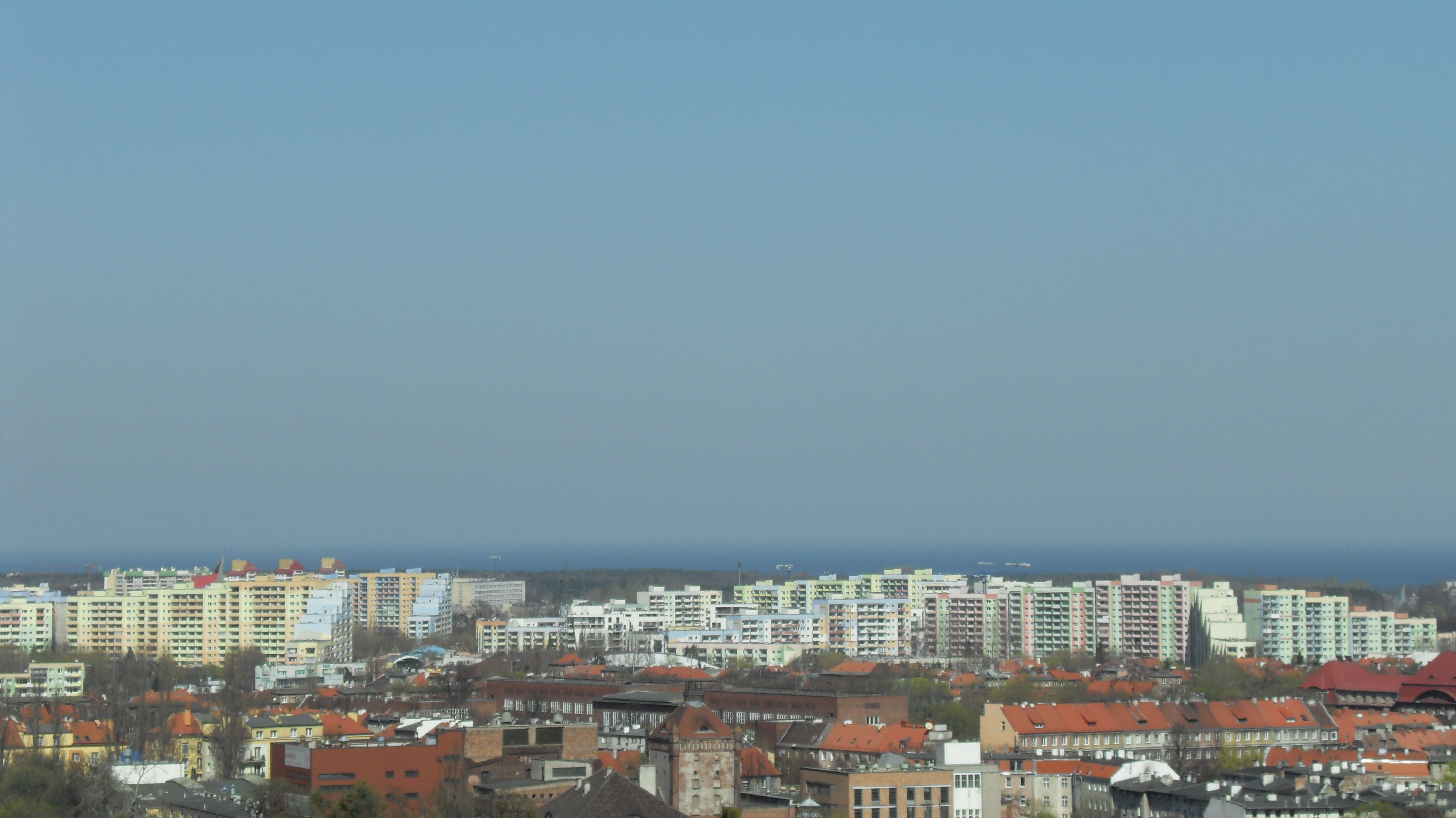 Gdańsk. Na pierwszym planie Wrzeszcz, dalej bloki Zaspy Rozstajów, w tle Zatoka Gdańska.